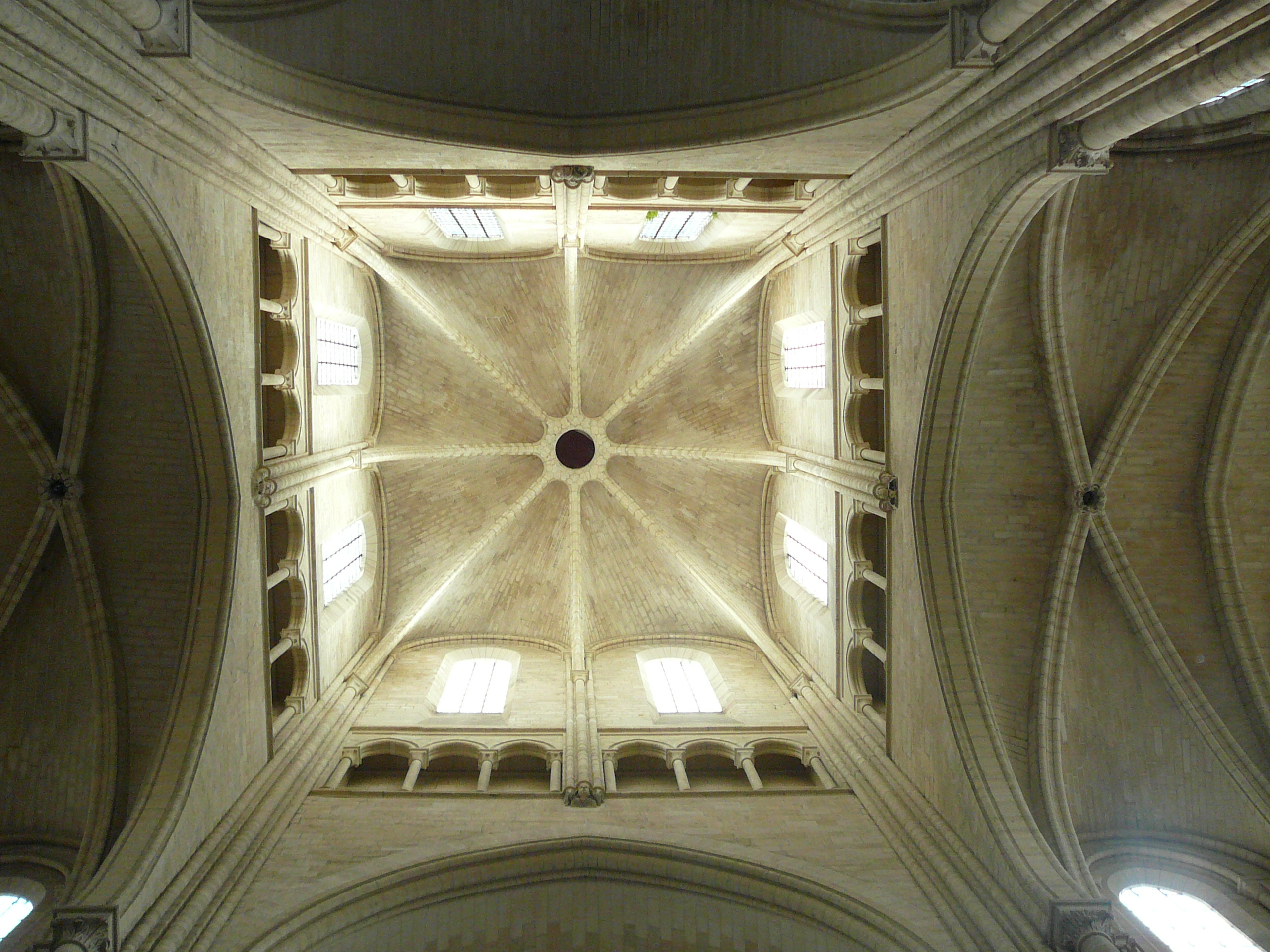 La tour lanterne de la cathédrale de Laon. Auteur So Leblanc, 2007.